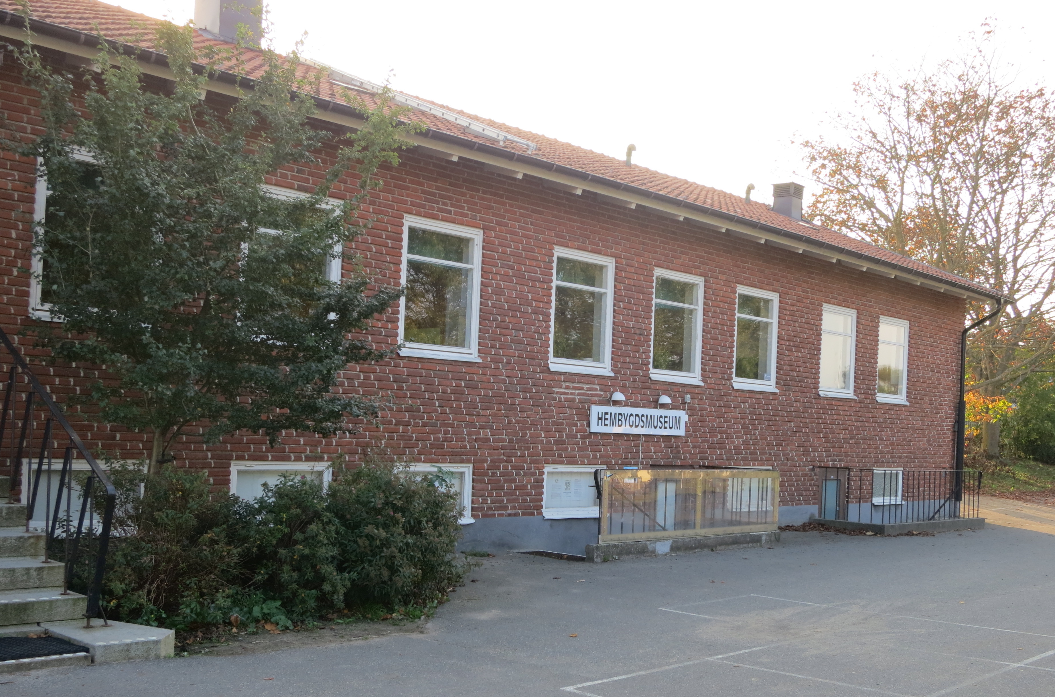 Hembygdsmuseet i Kivik